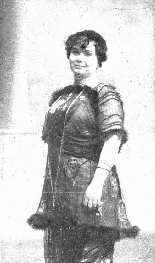 Fotografía de la actriz española Amalia Sánchez Ariño tomada en 1914 durante su interpretación de la obra Los leales